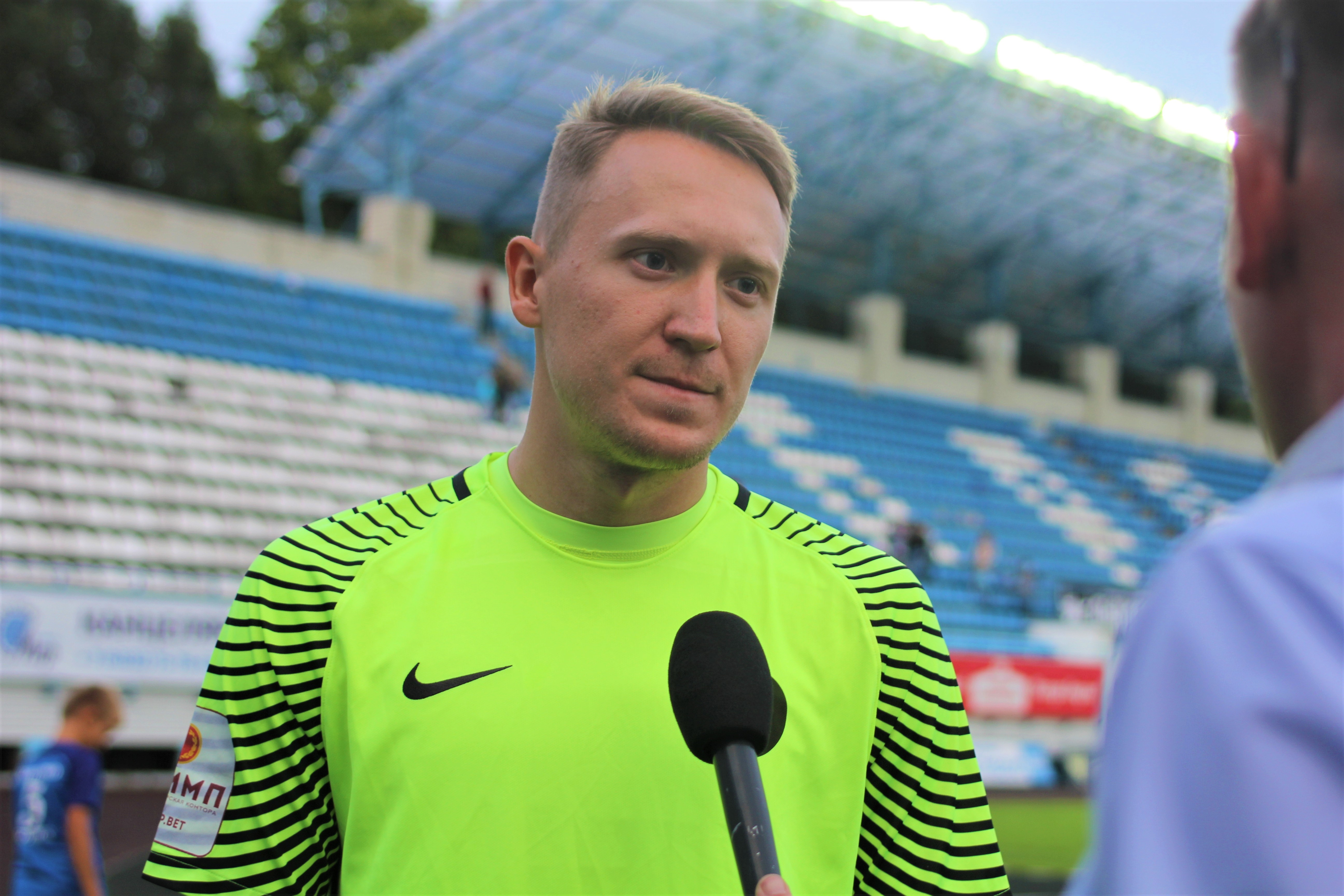 Футбол